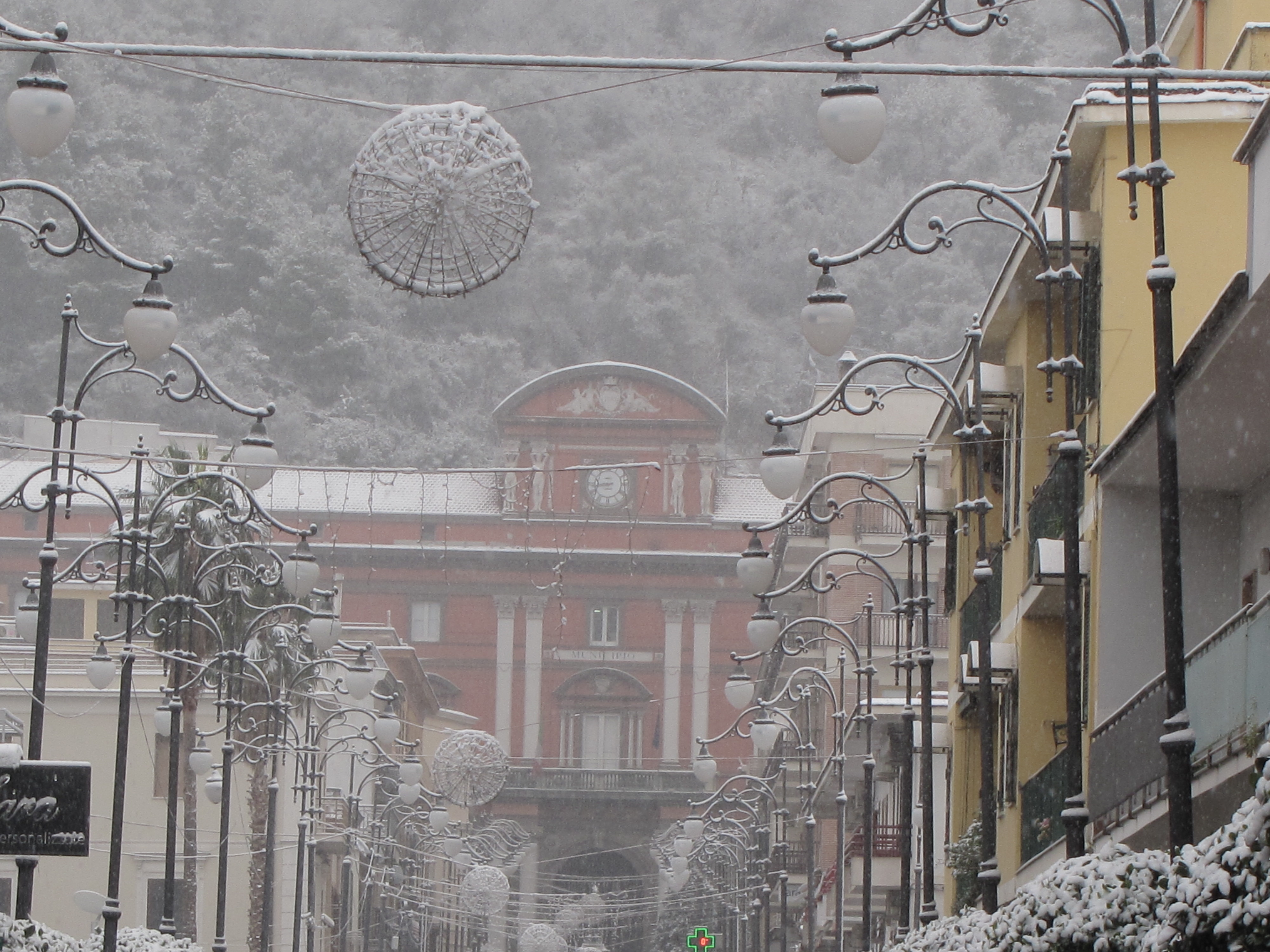 Il municipio di Sarno sotto la neve